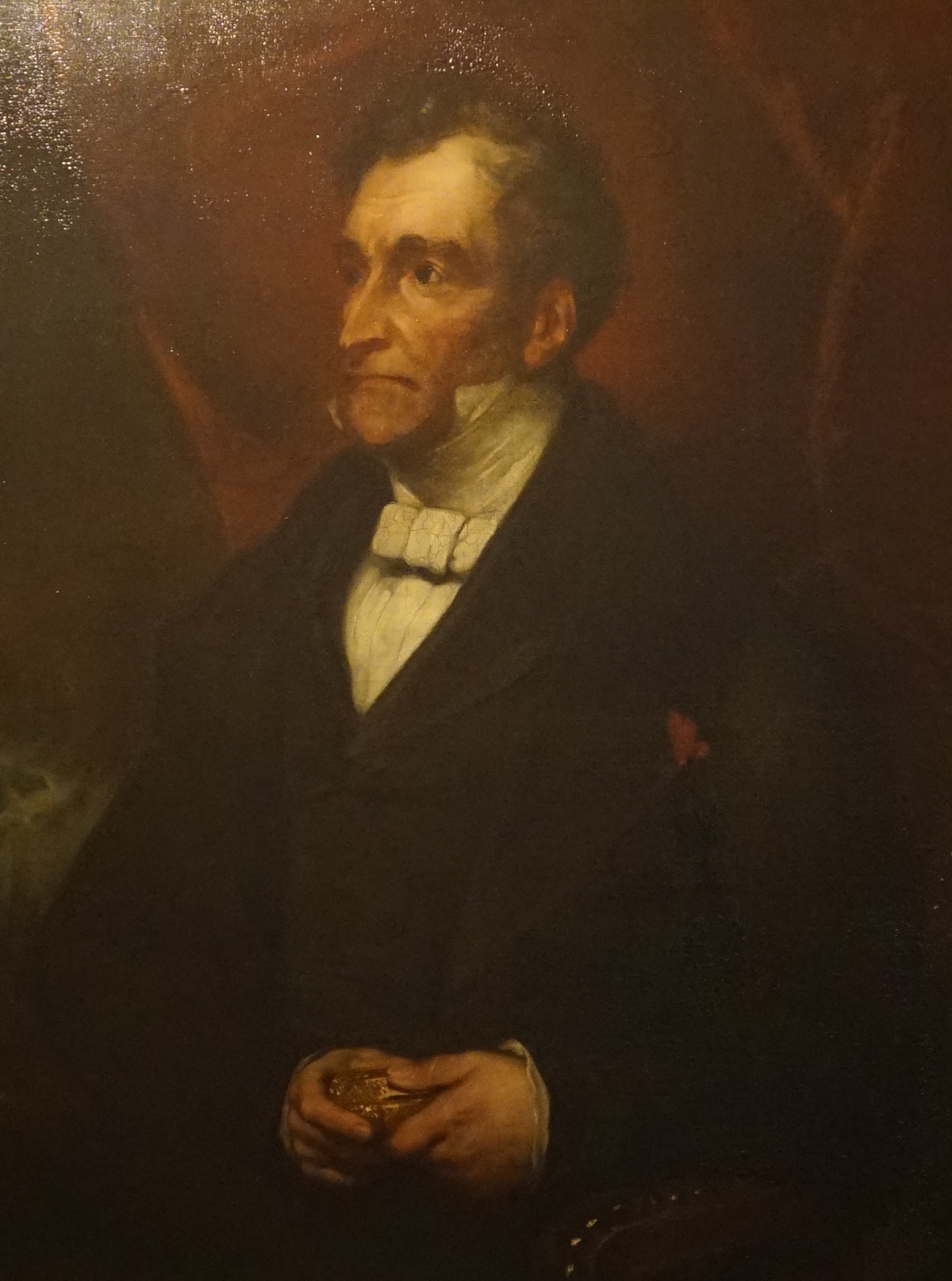 du musée de Toul.